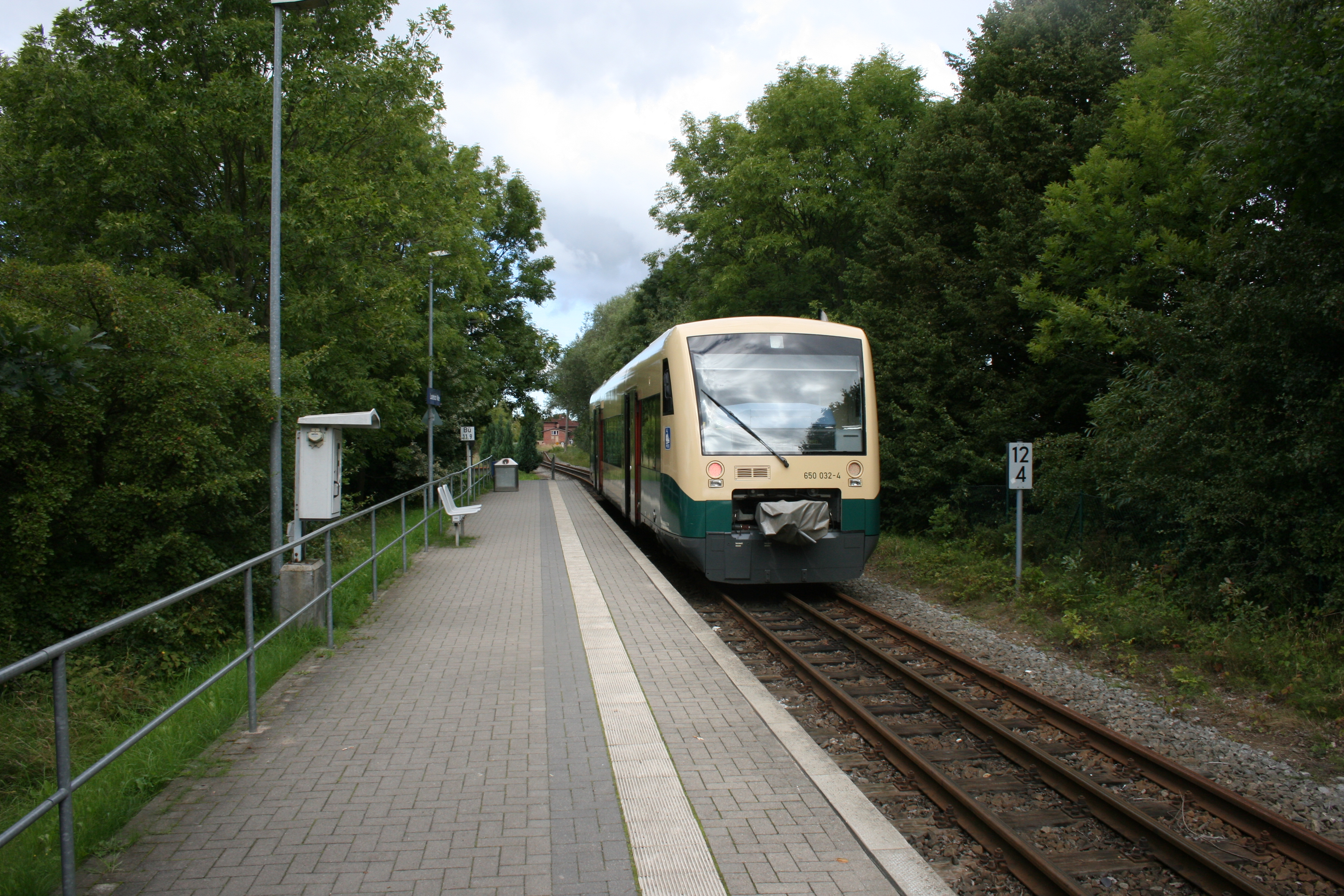 Haltepunkt Lauterbach Mole der Bahnstrecke Bergen Lauterbach